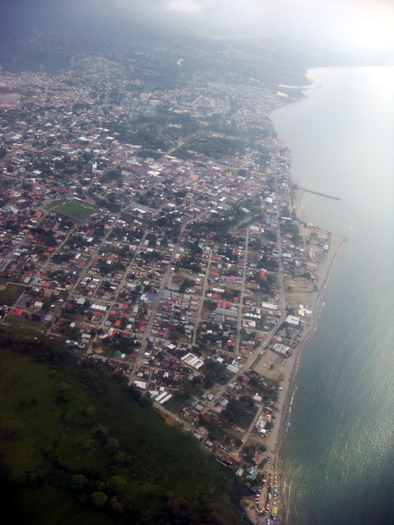 Vista Parcial de La Ceiba desde el Aire.